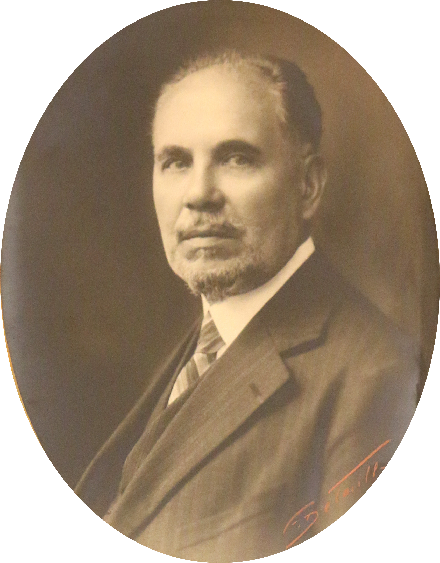 Photo de constant Roux à l'Académie de Marseille